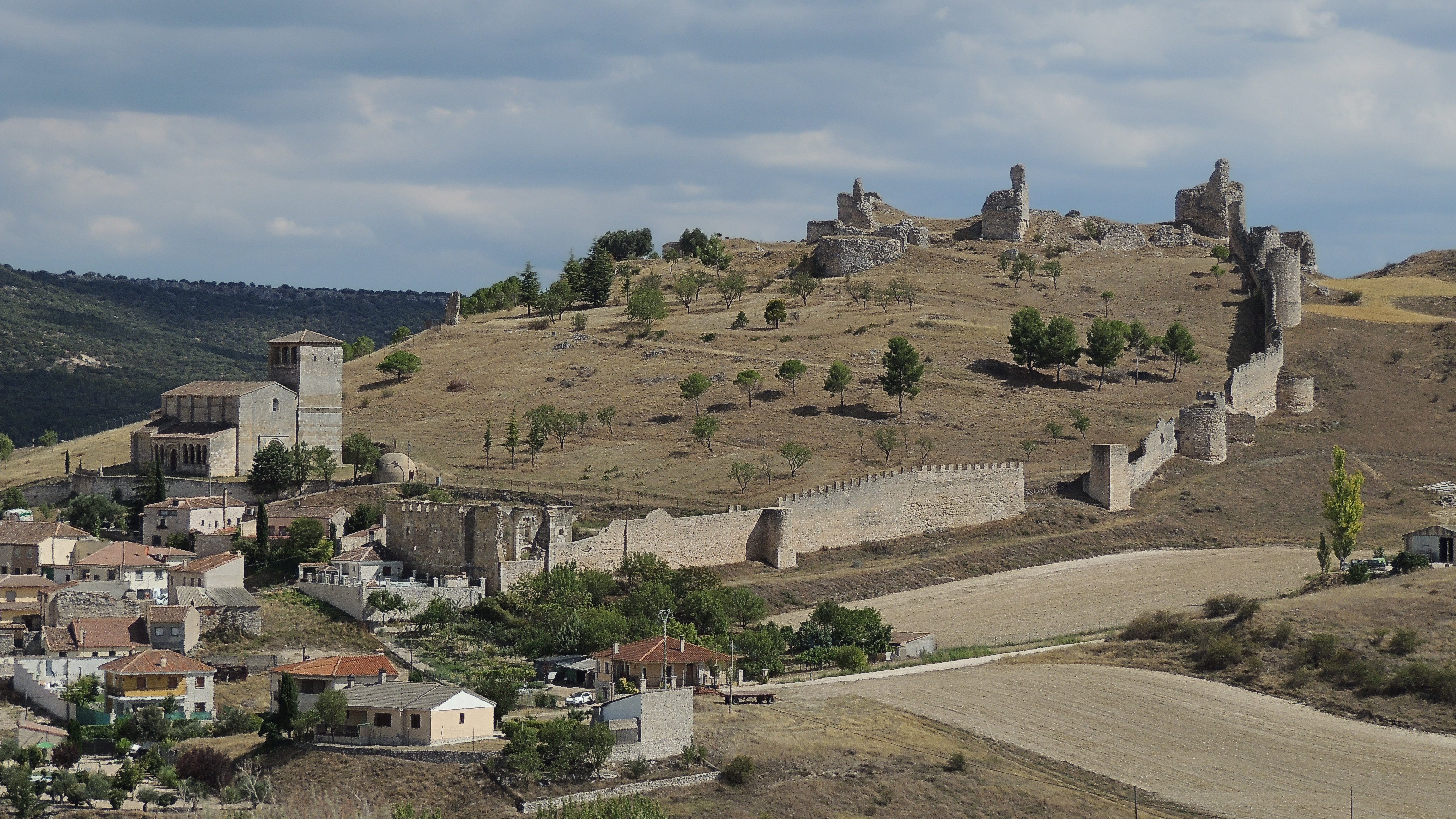 Murallas (Lado oeste)